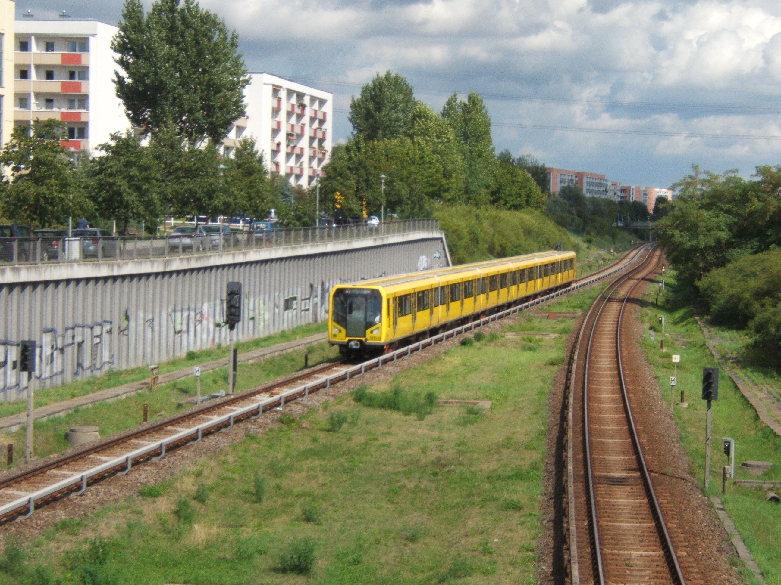 De Berlijnse metro